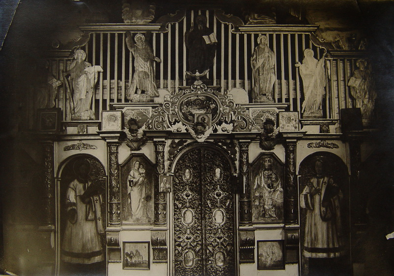 Беларуская (тарашкевіца): Слуцак (Słucak), Трайчаны (Trajčany): вуліца Трайчанская (vulica Trajčanskaja). Царква Сьвятога Стэфана або Трайчанская могілкавая царква